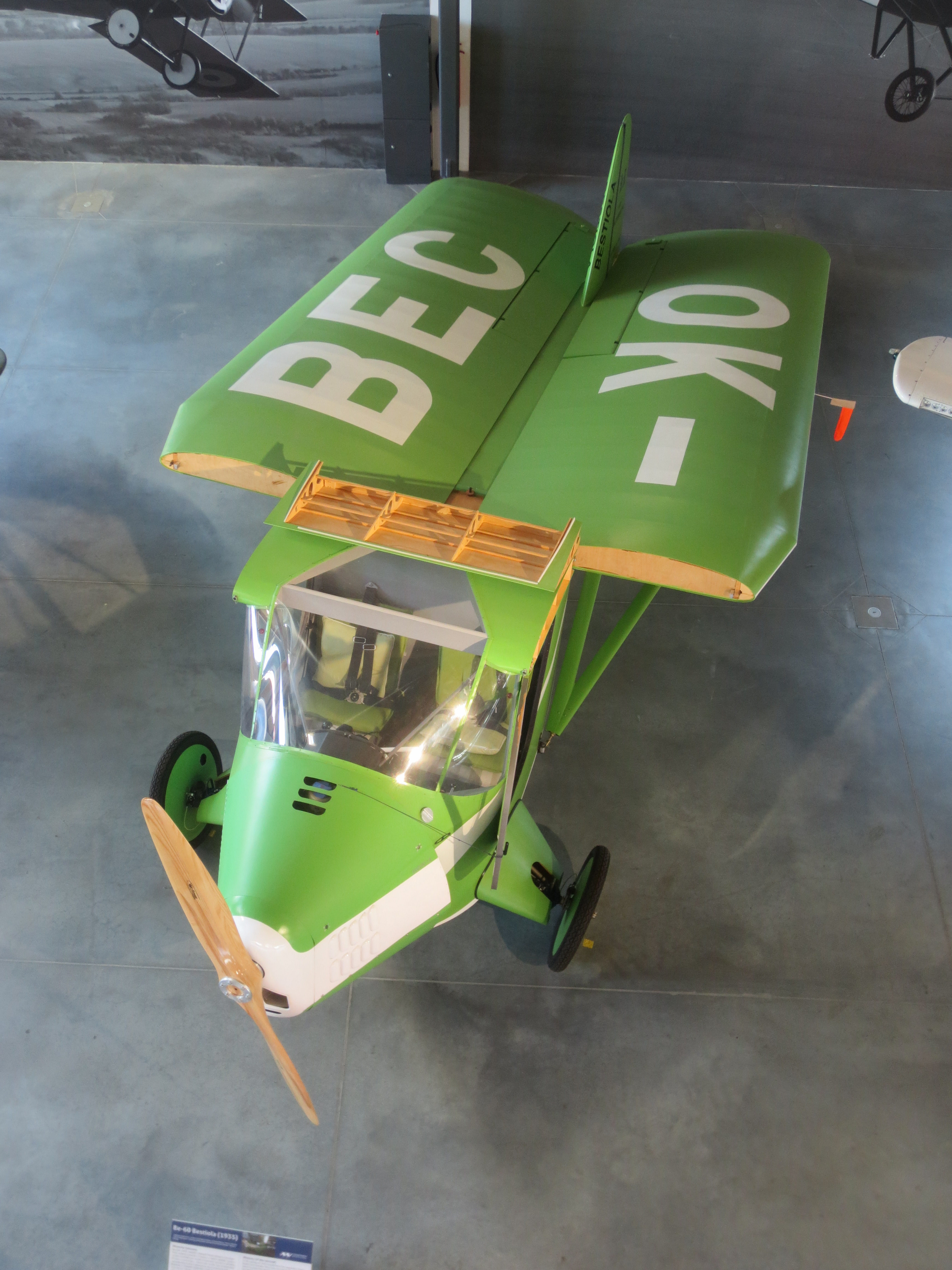 Replika Beneš-Mráz Be-60 Bestiola (1935), Letecké muzeum Mětoděje Vlacha Mladá Boleslav